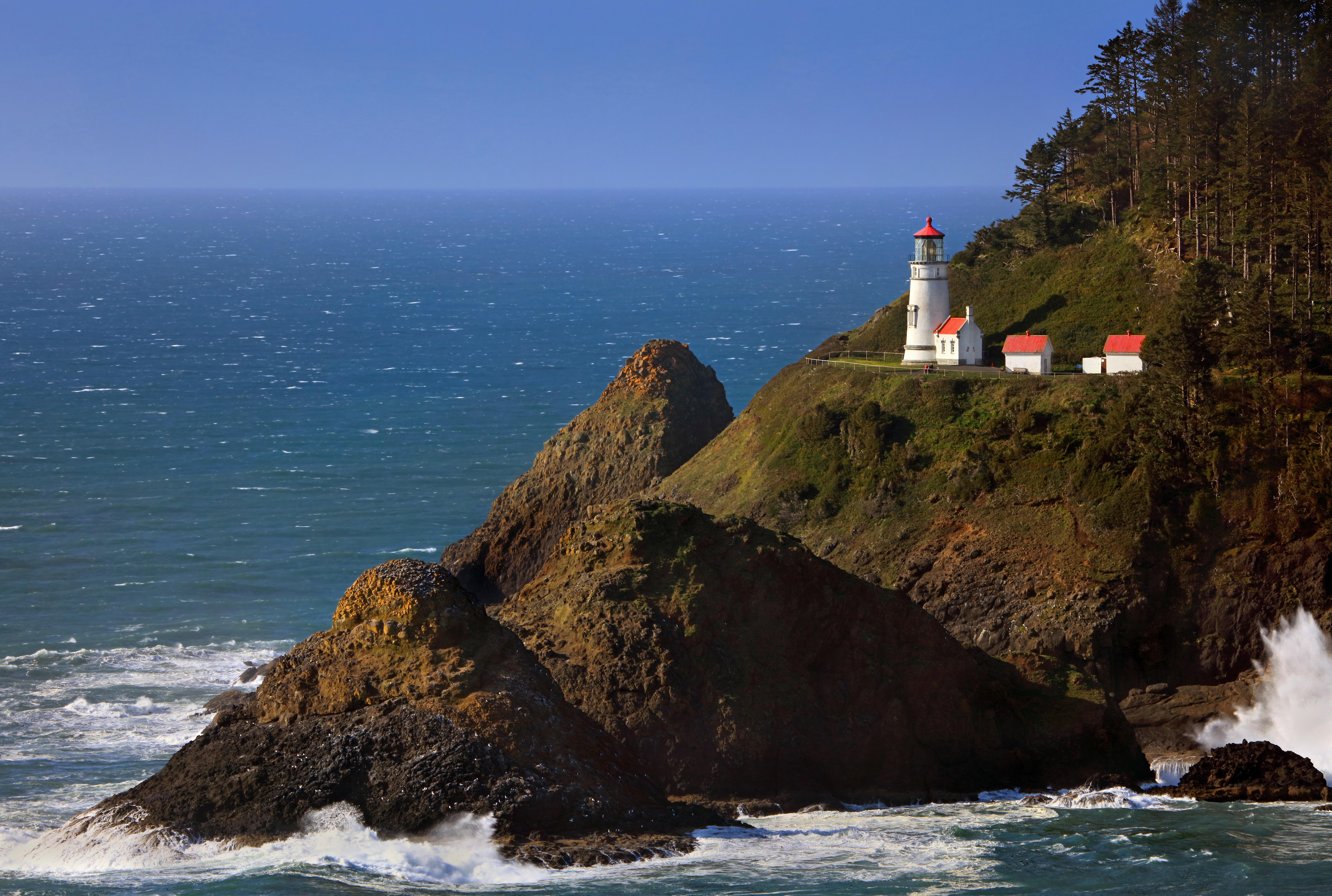 Fluidr